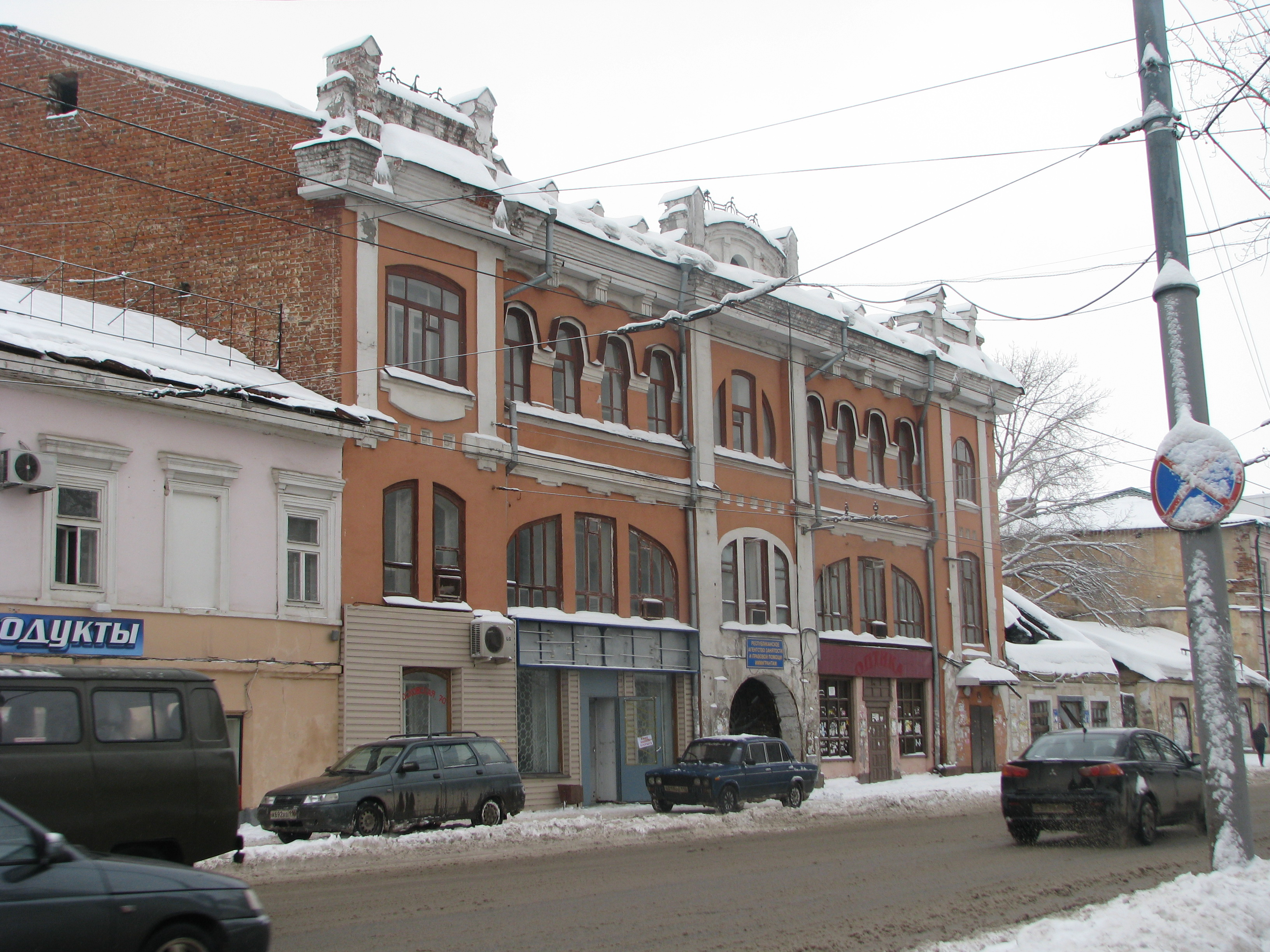 Вид здания со стороны фасада